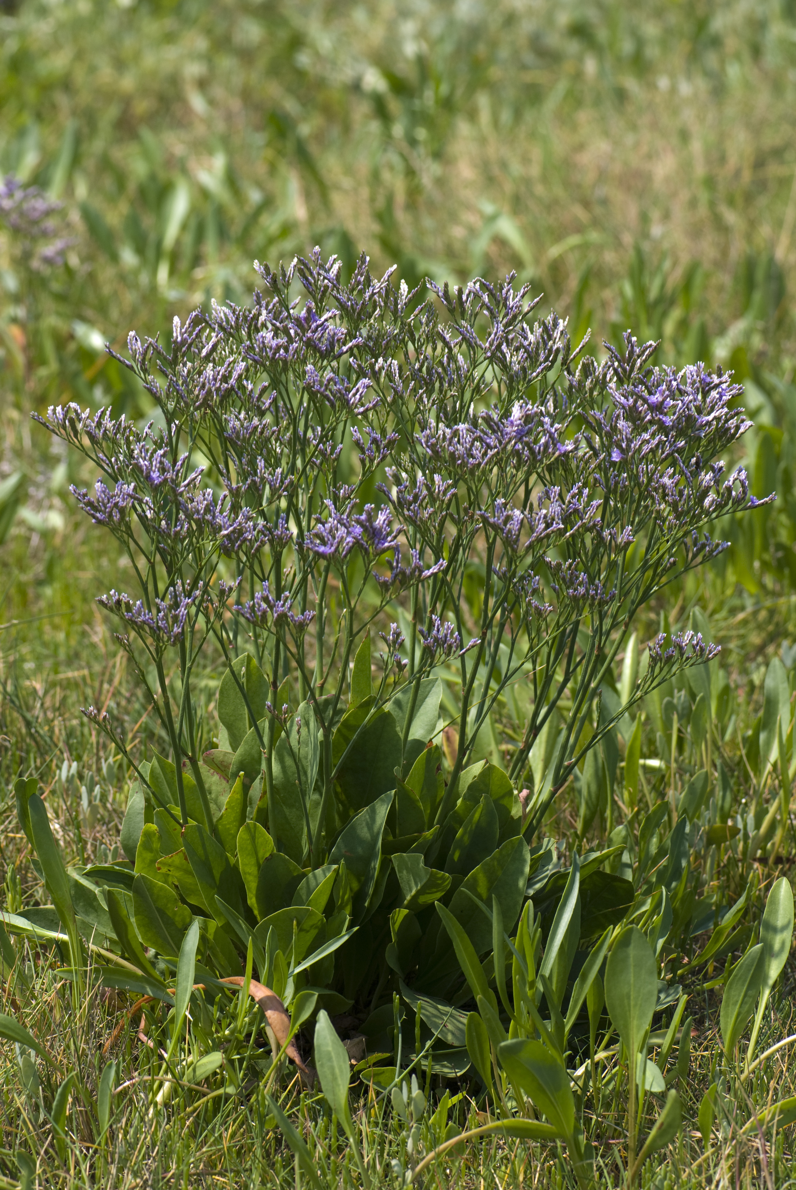 Limonium vulgare Baie d'Authie (Somme), France